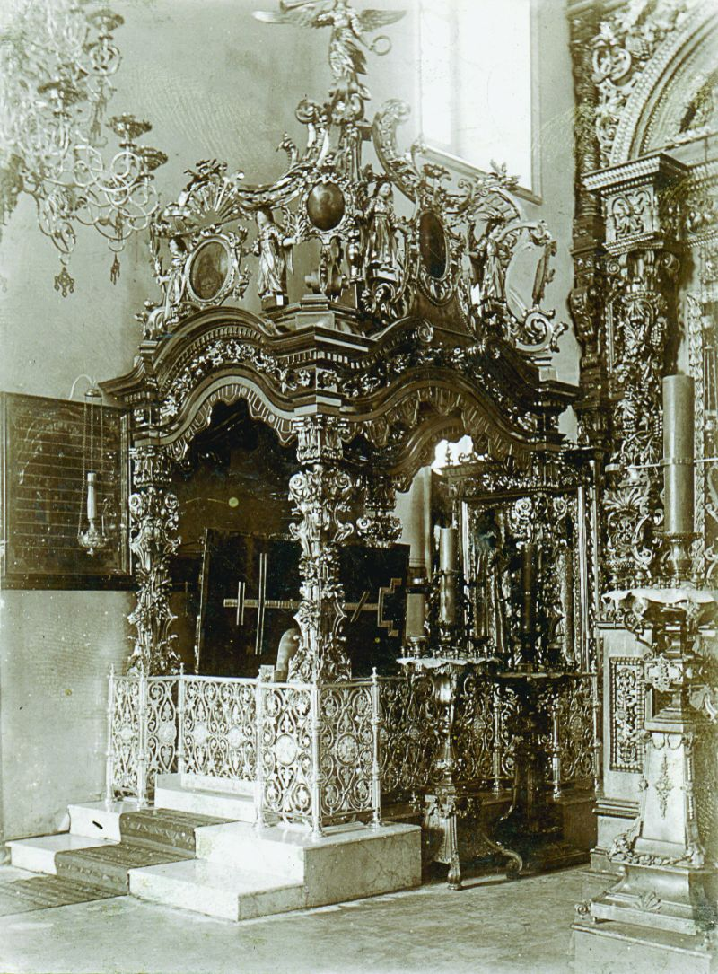 Рака с мощами свв. Петра и Февронии Муромских в Богородице-Рождественском соборе.